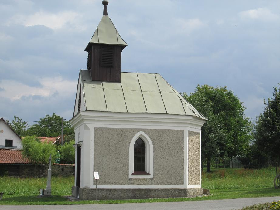 Josefov